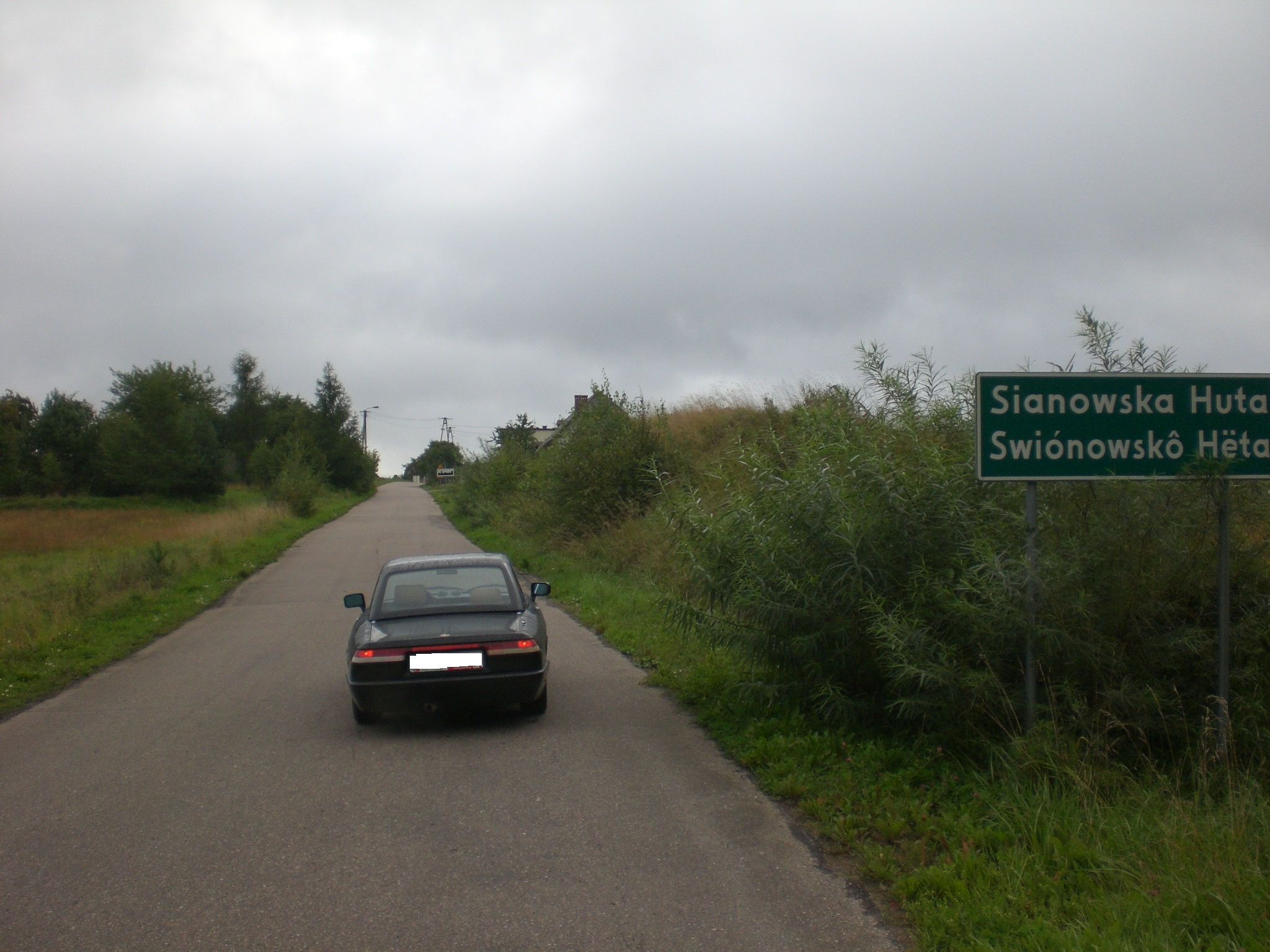 Sianowska Huta